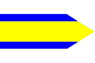 flag male chyndice